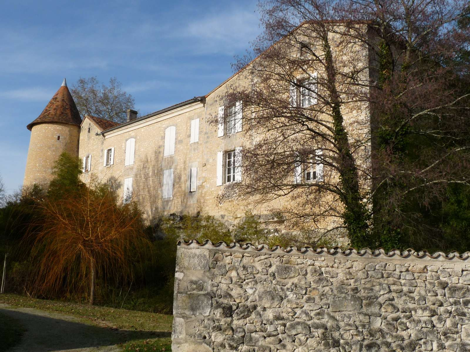 mairie, château, parc-arboretum de Blanzaguet, Charente, France